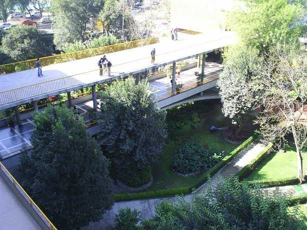 Facultad de Ingeniería Jardines del edificio principal de la Facultad de Ingeniería. Esta foto fue tomada por mi, y la paso a dominio público. Categoría:México (imagen)